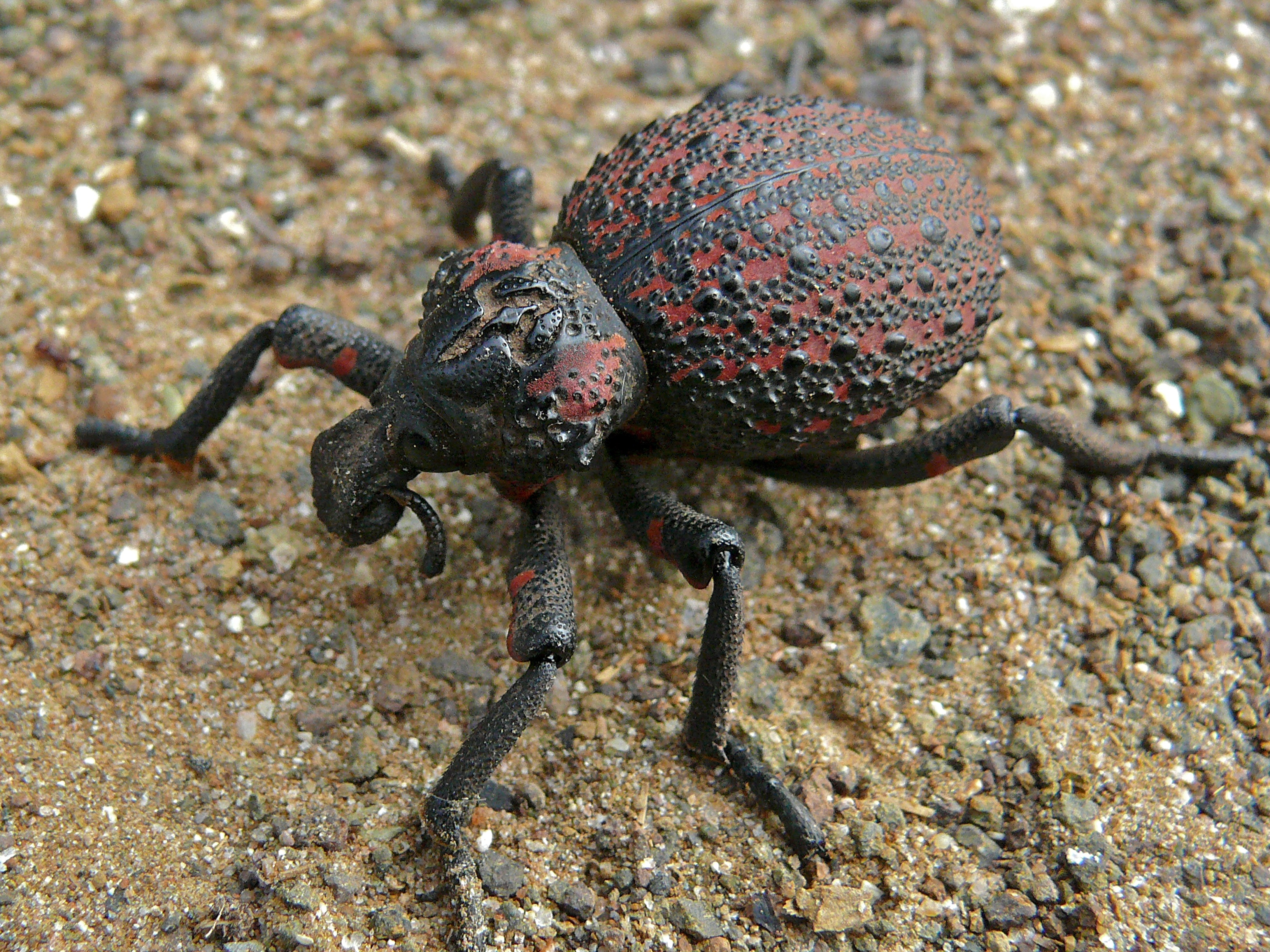 S63 near Pafuri, Kruger NP, SOUTH AFRICA